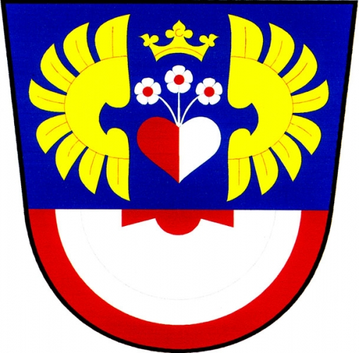 znak, Milíčovice, okres Znojmo